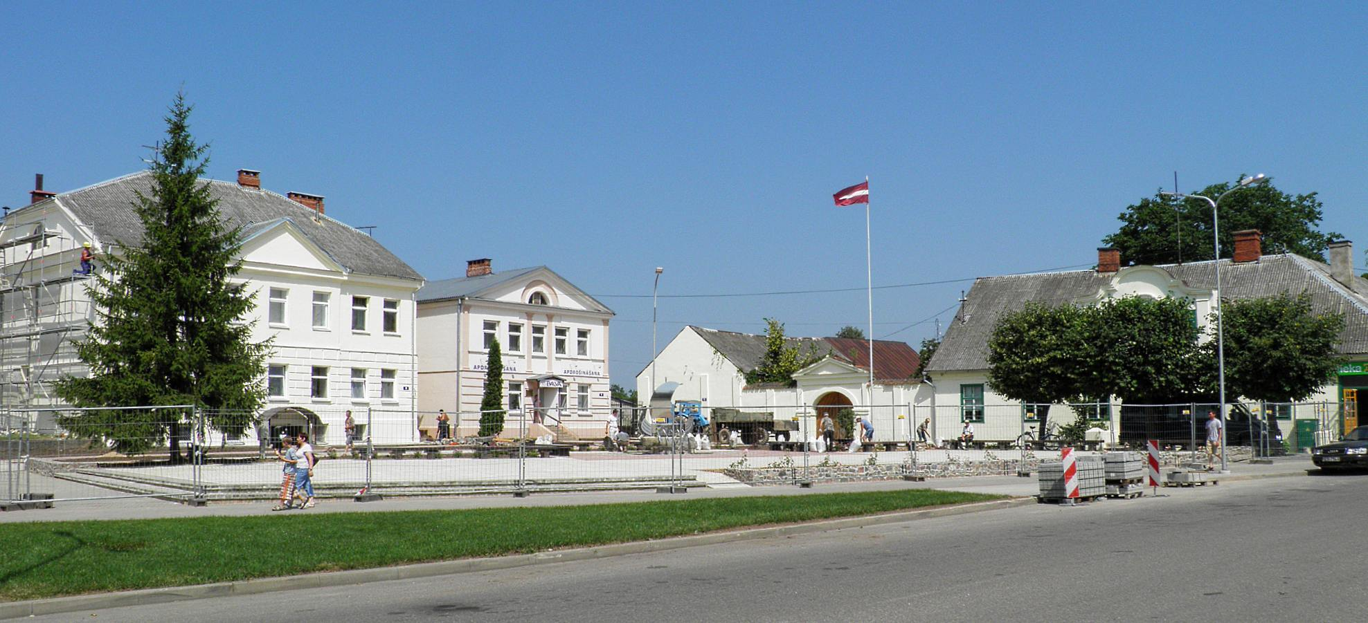 Krasław, centrum miasta